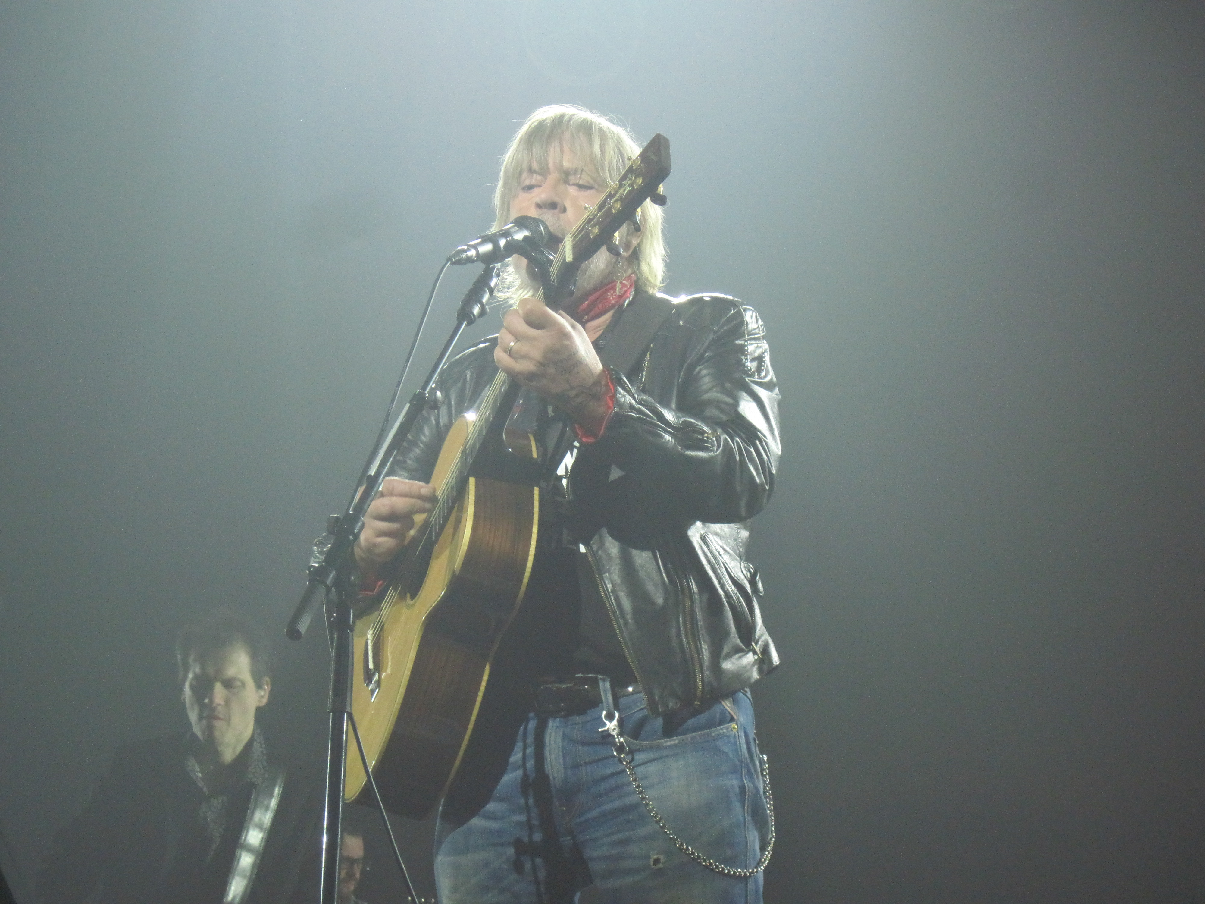 Renaud en concert au Zénith de Paris.